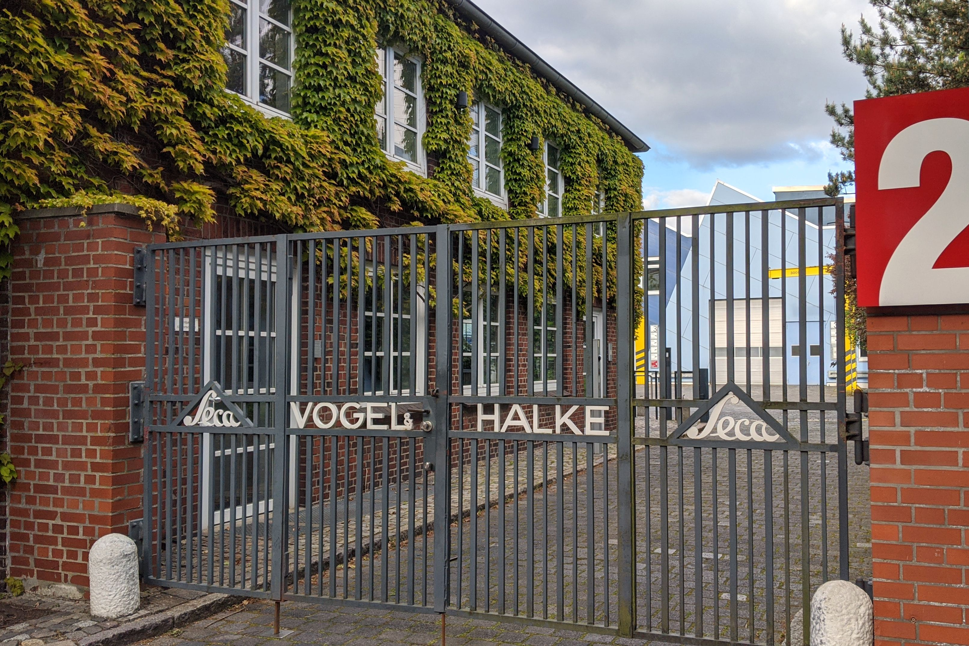 Hammer Steindamm in Hamburg-Eilbek, Einfahrt zur Traditionsfirma "seca - Vogel & Halke" (seit 1840), Hersteller von Präzisionswaagen und Medizintechnik